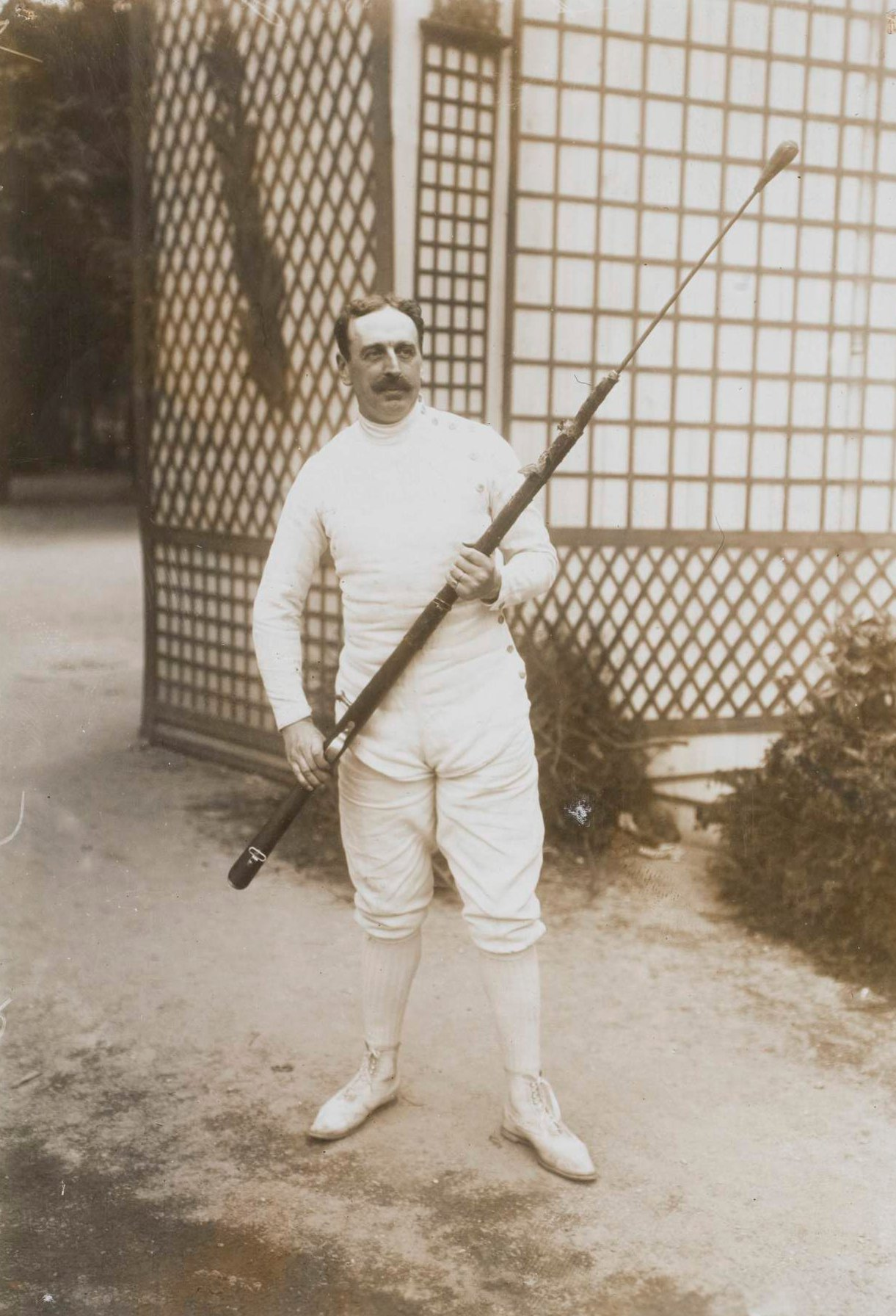 Grande semaine d'escrime aux Tuileries. Le championnat d'escrime à la baïonnette. Capitaine Perrodon, le gagnant. (cropped by the uploader, flickr uploader is down today)